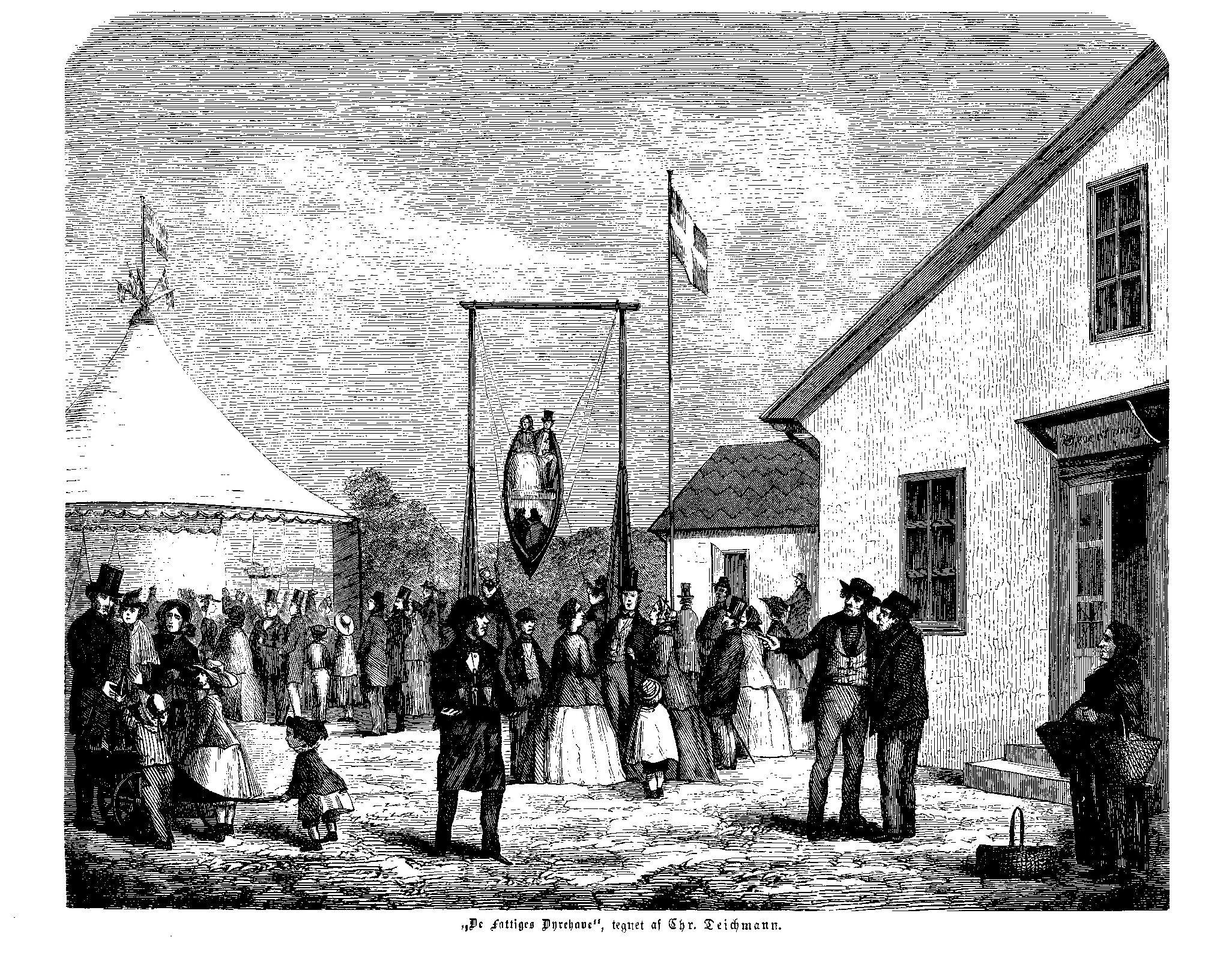 De Fattiges Dyrehave, former amusement park in Copenhagen